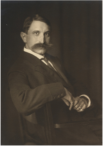 Professor Dr. Friedrich Wilhelm Freiherr von Bissing (um 1910). Photographie von Theodor Hilsdorf (Atelier Müller-Hilsdorf), © Münchner Stadtmuseum, Inv.-Nr. G 28/1379.